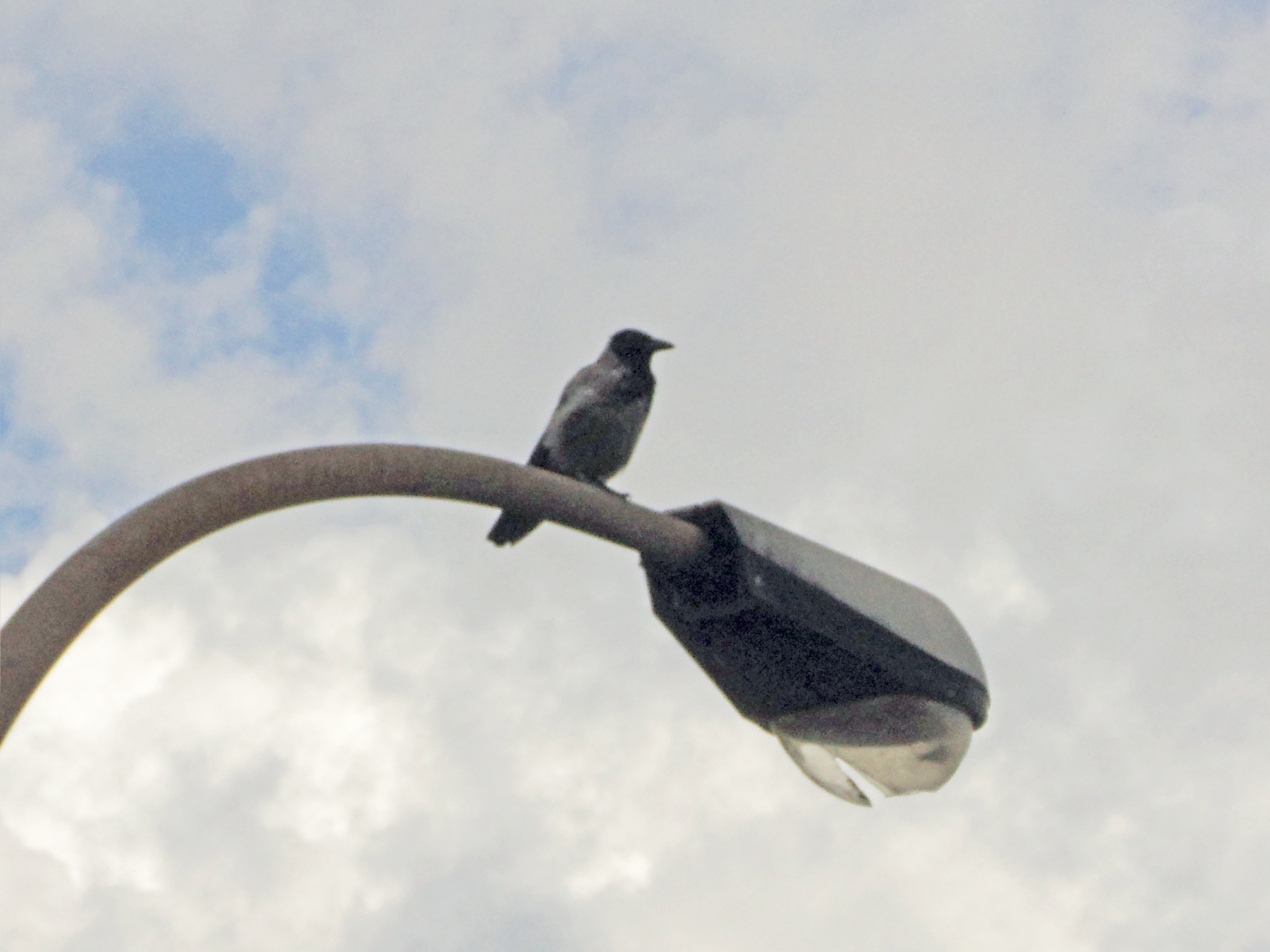 Via Collatina, Roma - Cornacchia grigia Corvus cornix.